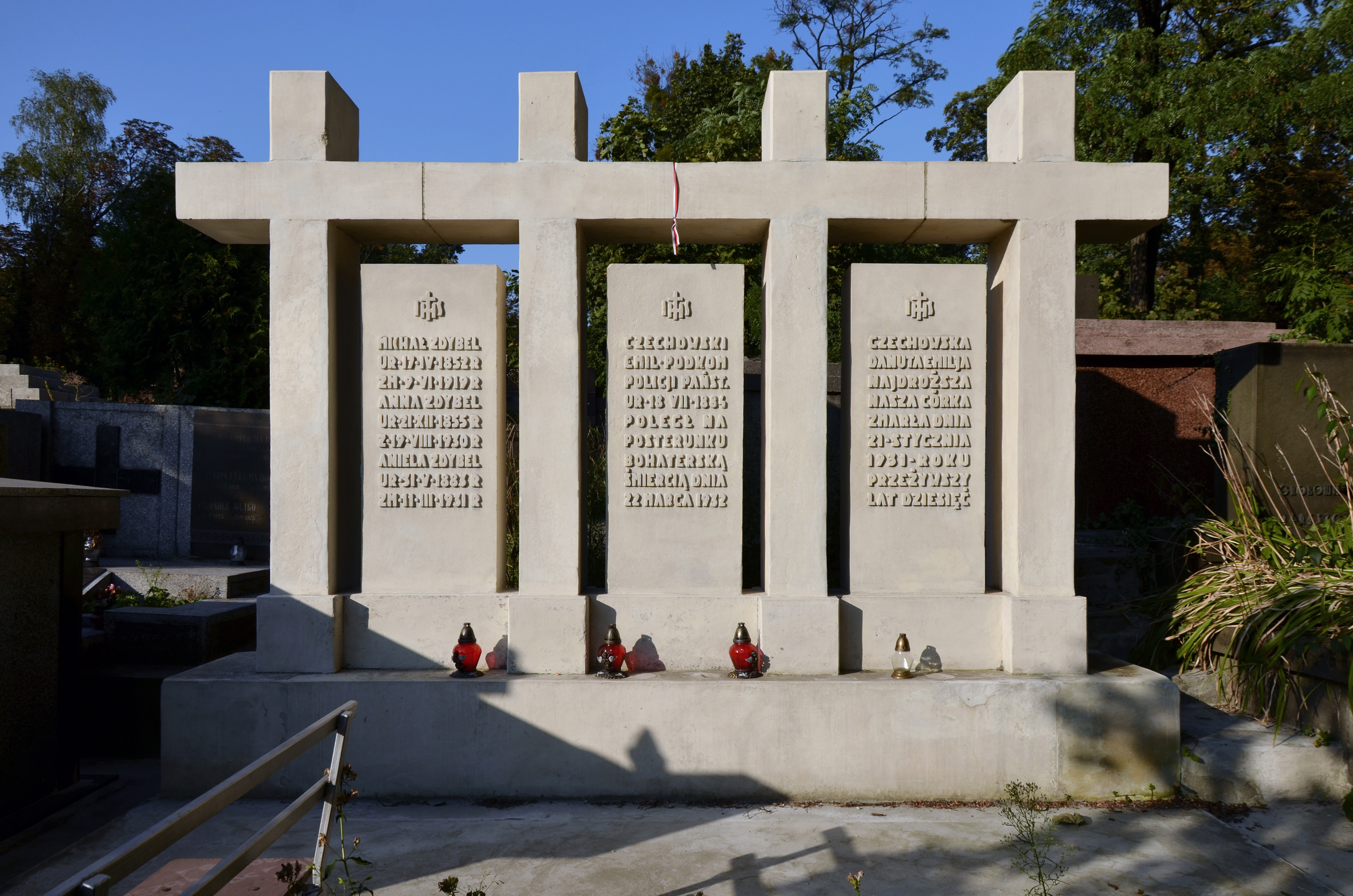 Надгробок Здибелів і Чеховських на Янівському цвинтарі у Львові.